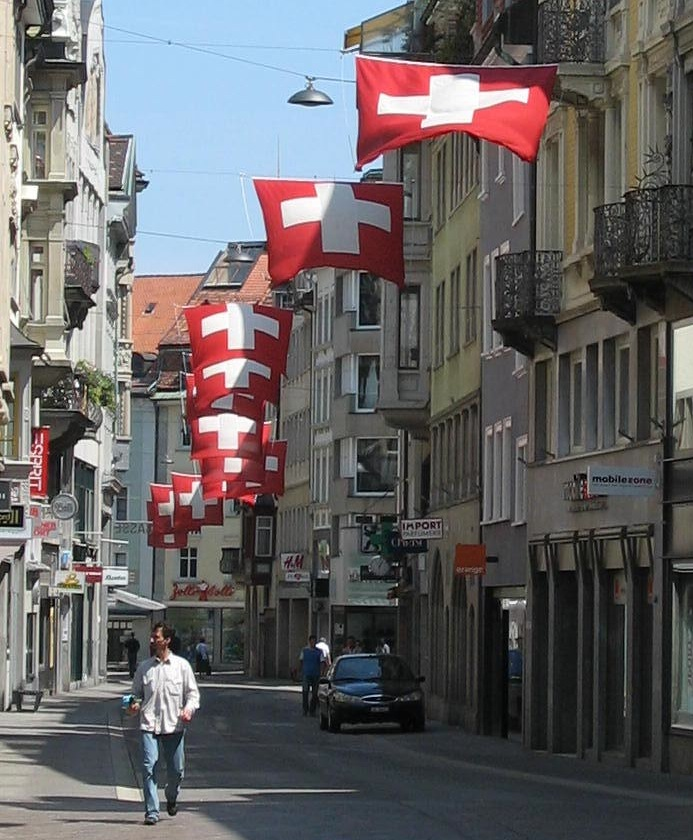 Schweizerflaggen in der Multergasse in St. Gallen, 2 Tage vor dem Nationalfeiertag.